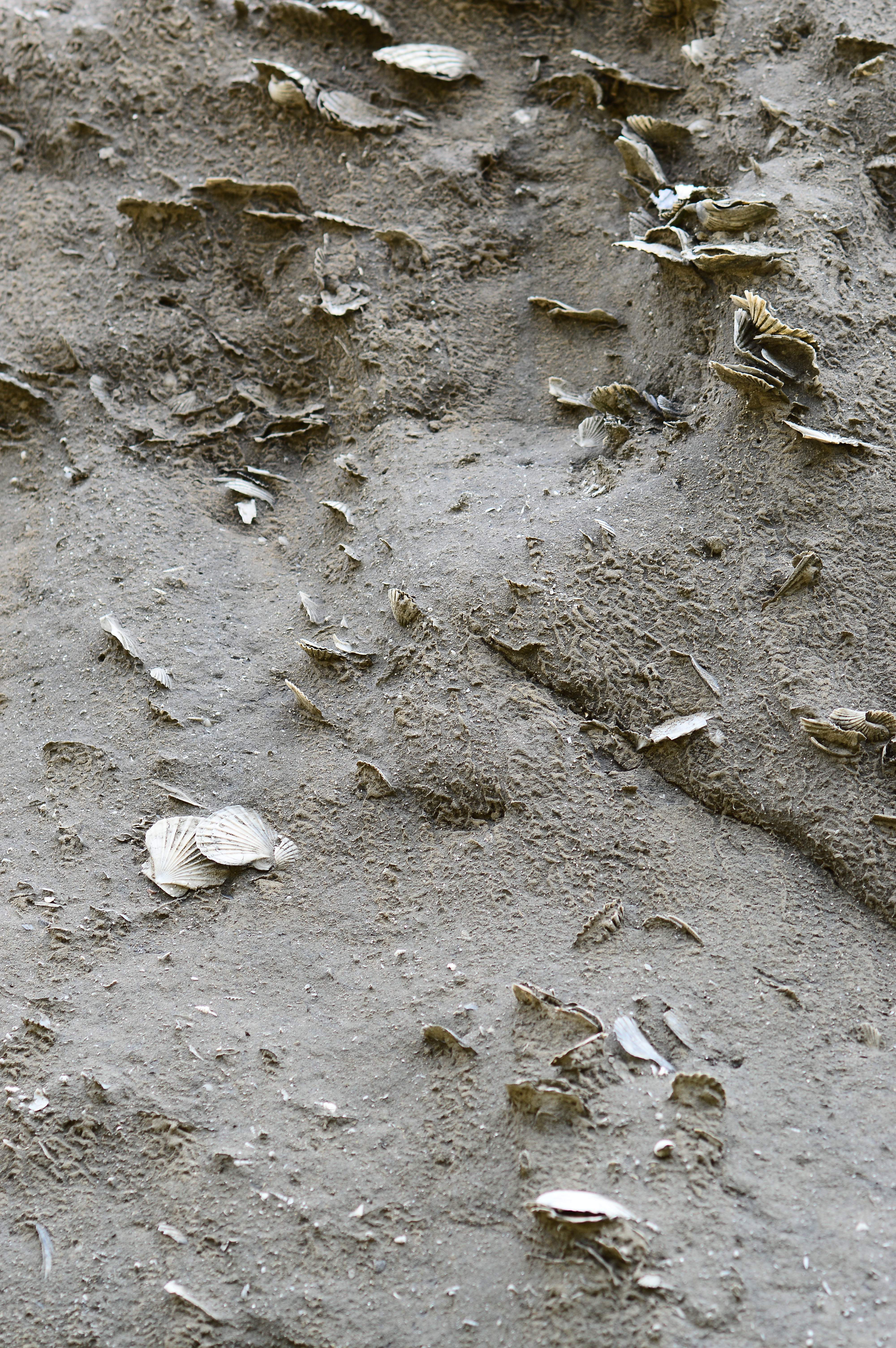 2016年過港貝化石層